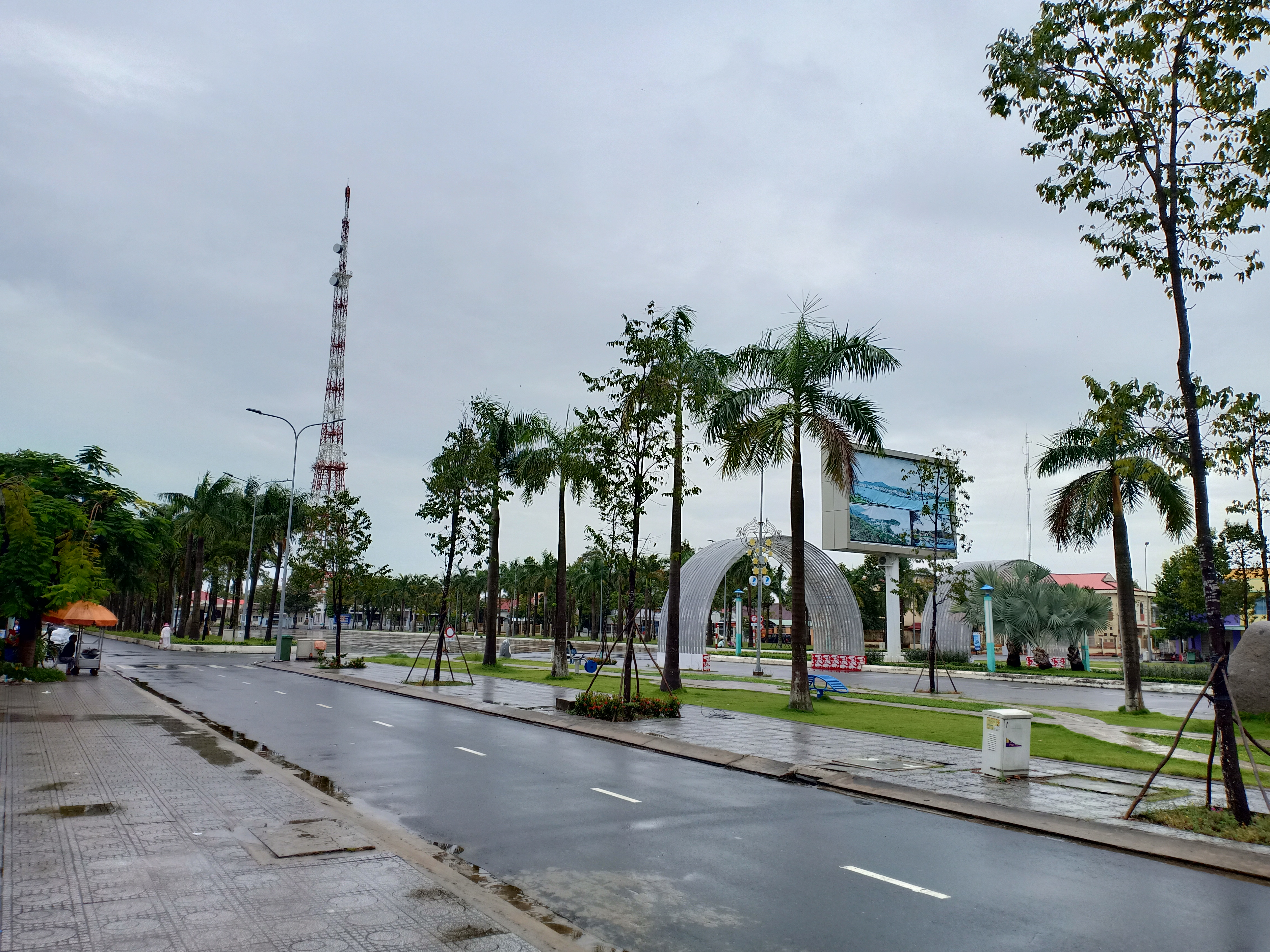 Một góc quảng trường Hà Tiên.